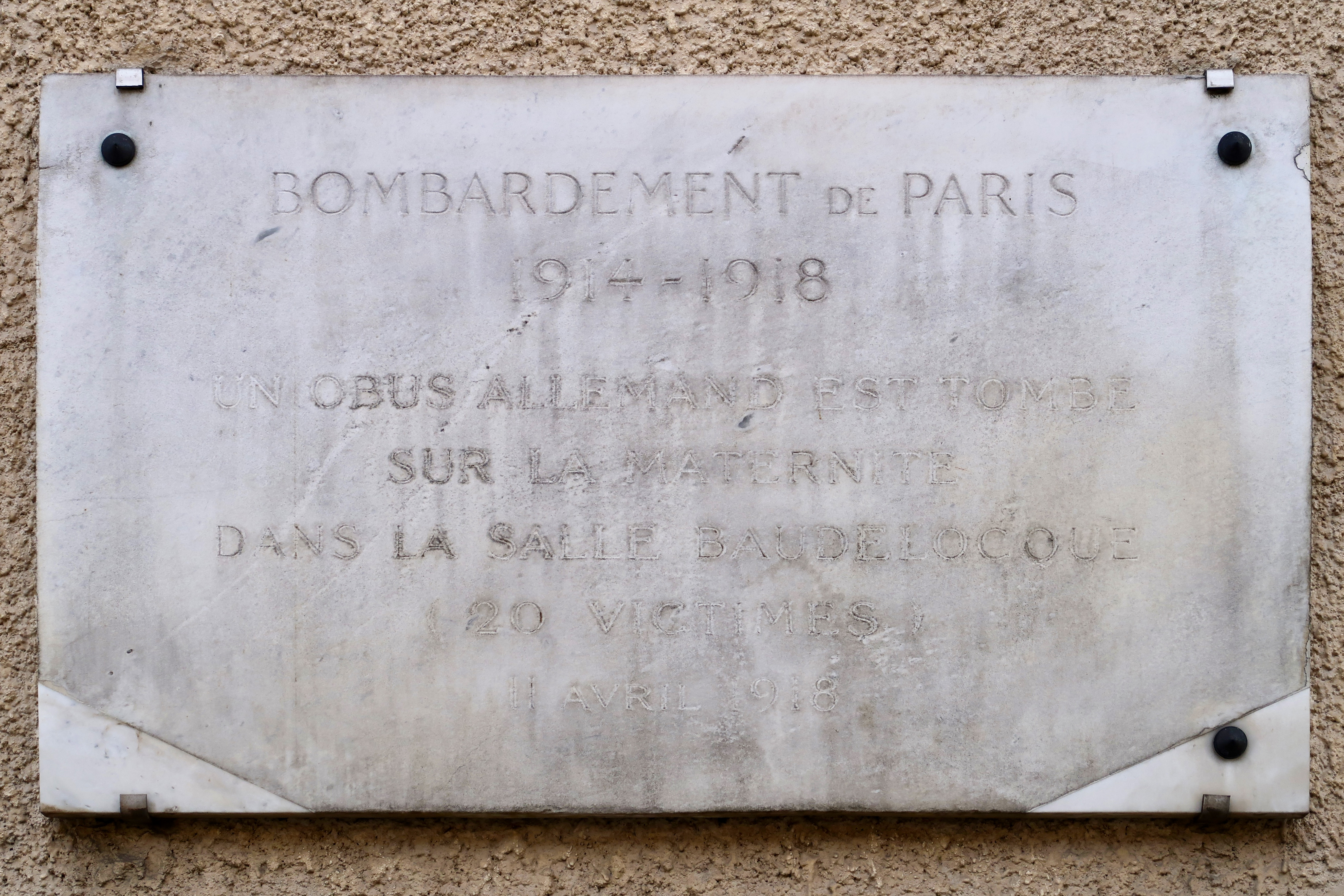 Plaque en hommage aux bombardements de Première Guerre mondiale (contre l'ancienne abbaye de Port-Royal de Paris), 119-125 boulevard de Port-Royal (Paris, 14e).